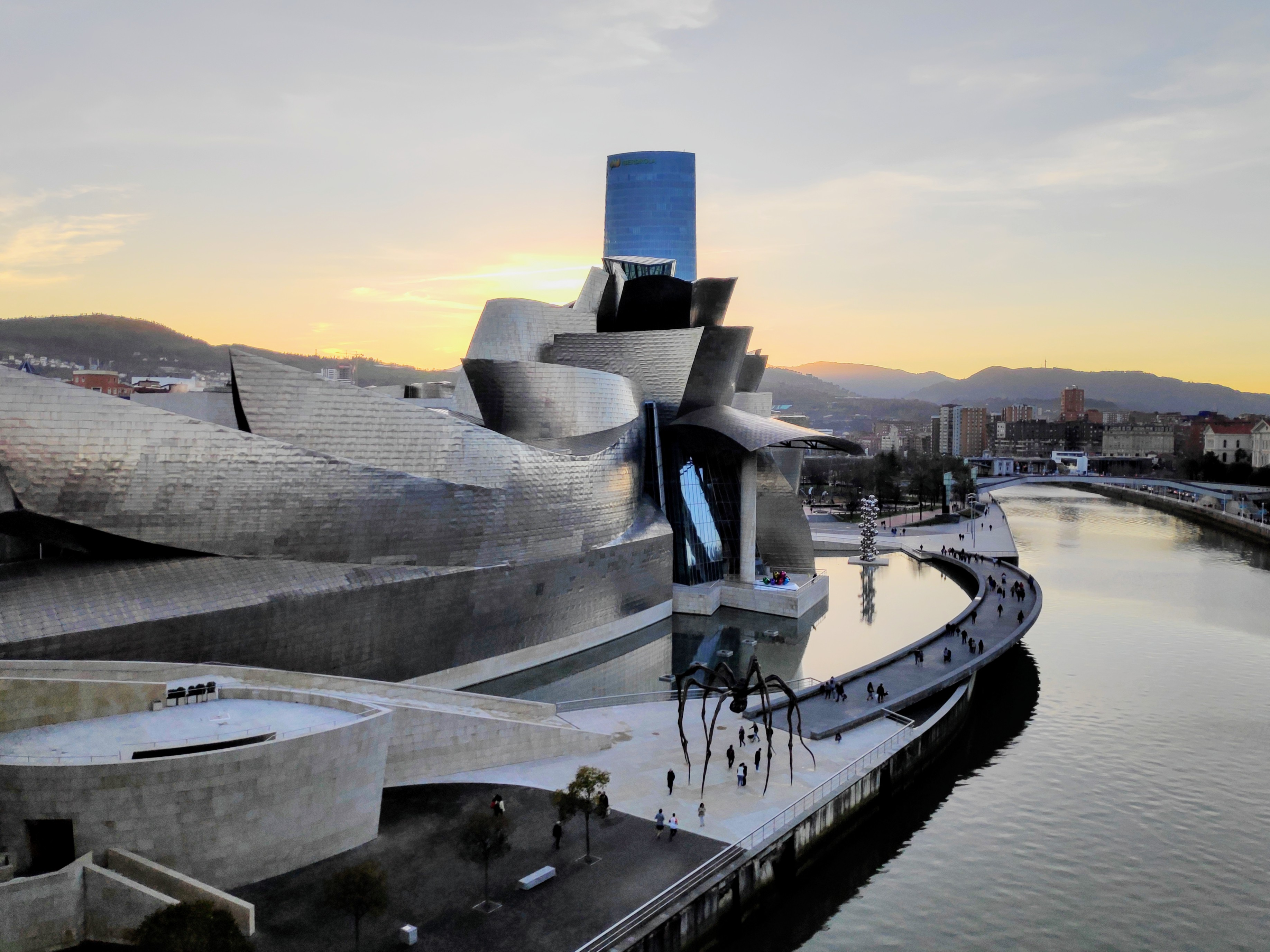 Bilbao, vistas a la ria